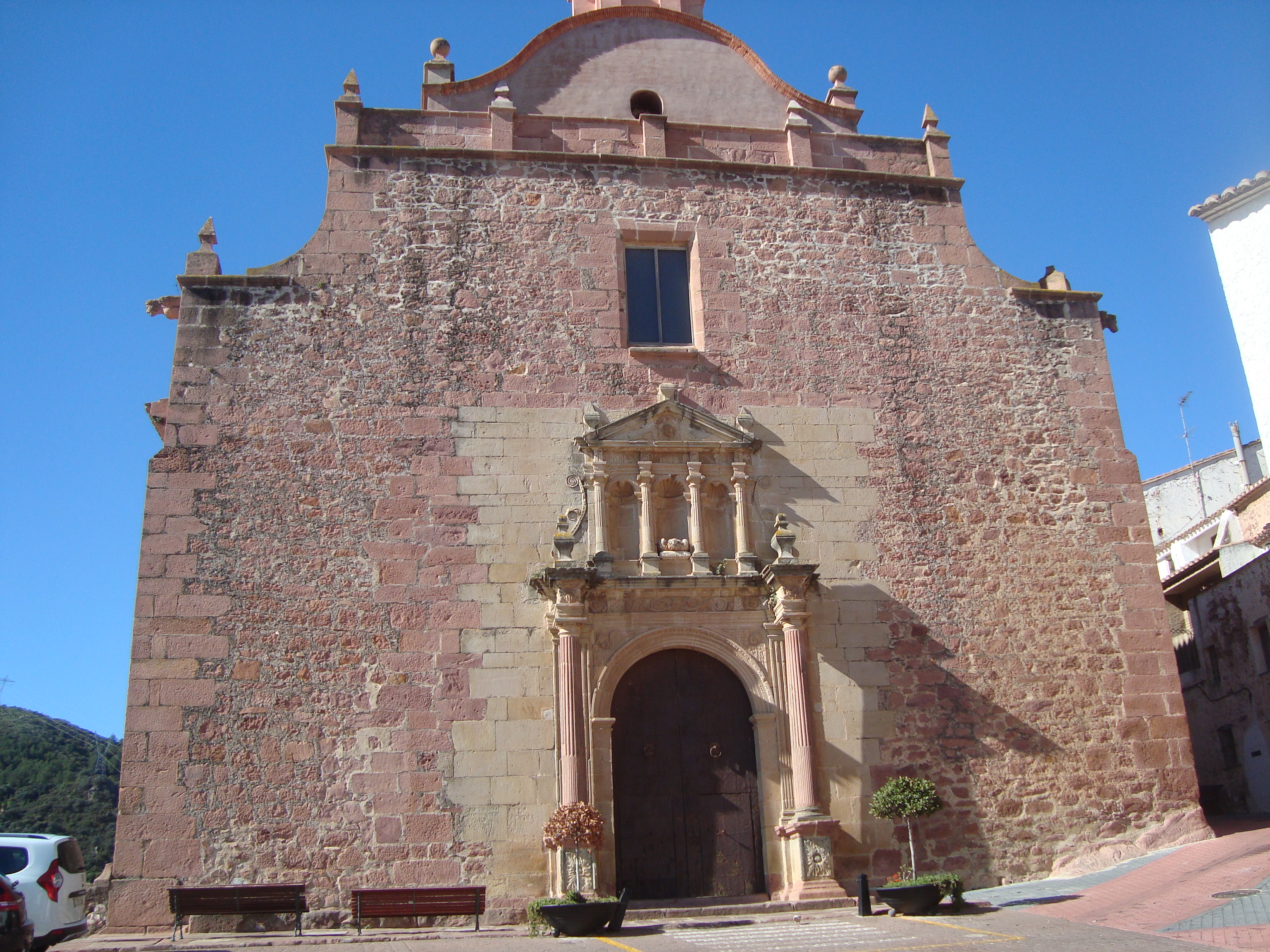 Església parroquial de l'Assumpció (Vilafamés) 05.128-004.